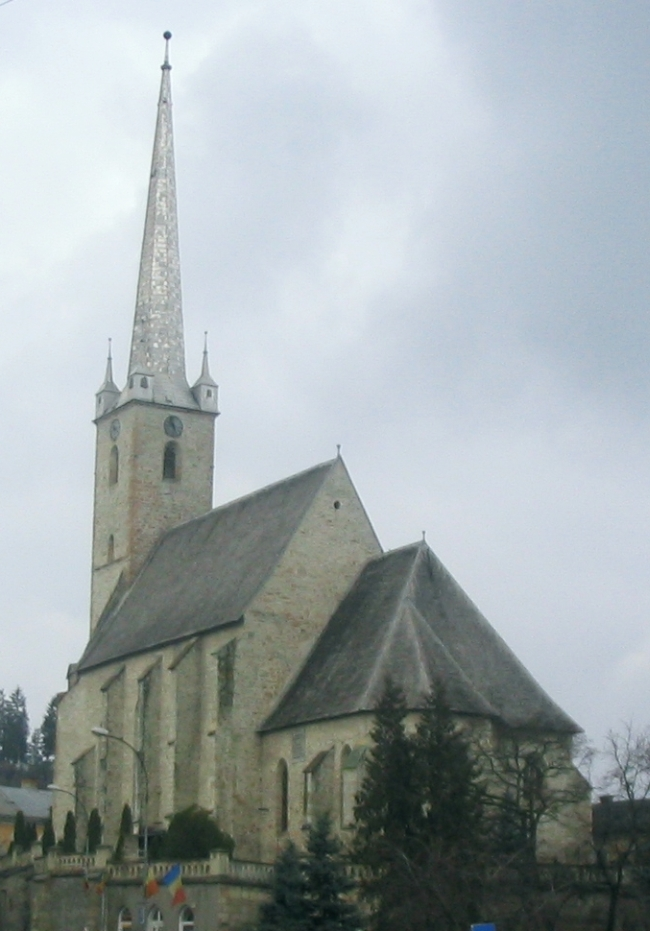 Dej: Biserica Reformata - Dés: Református templom